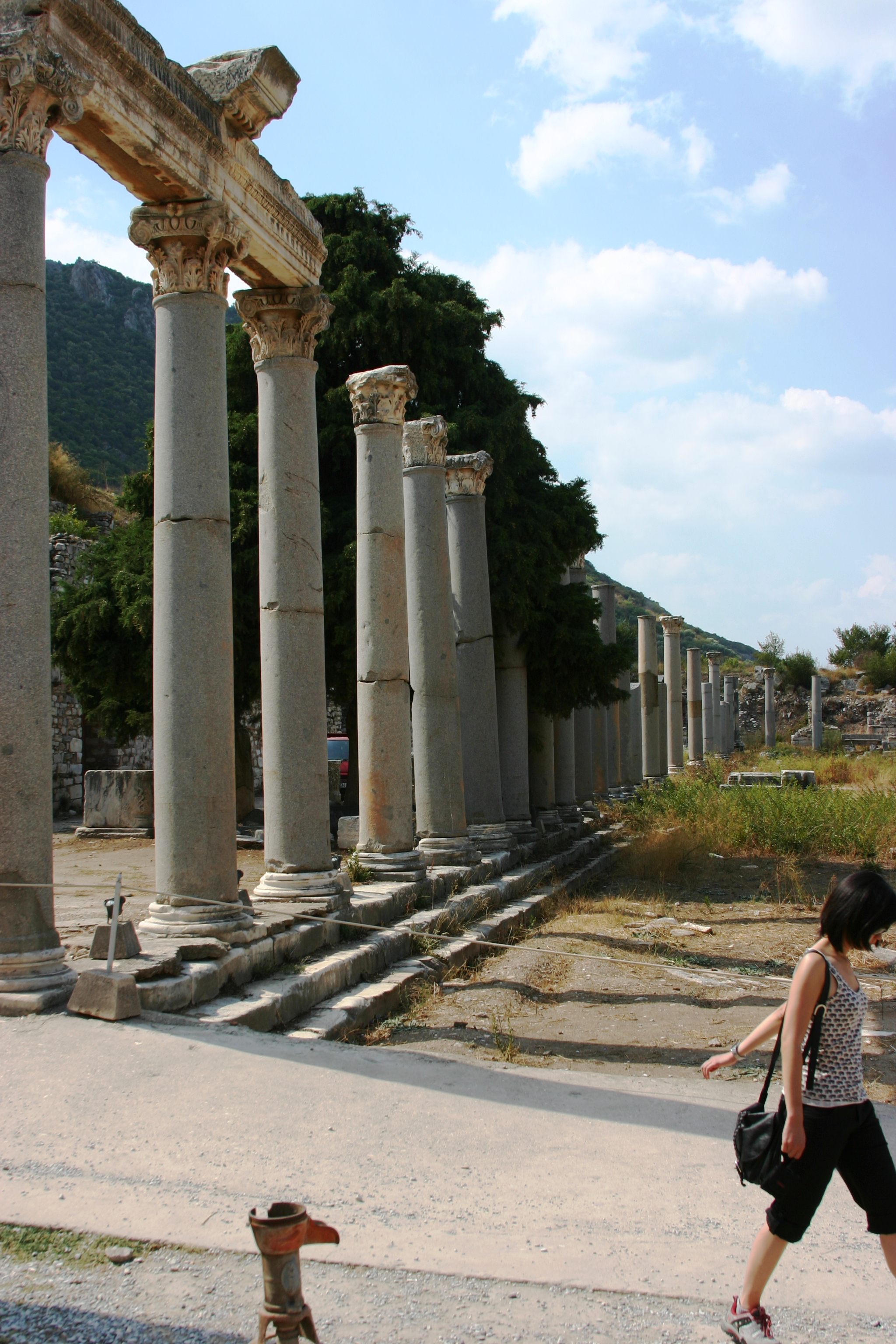 Ágora de Éfeso